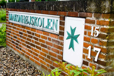 Diakonhøjskolen